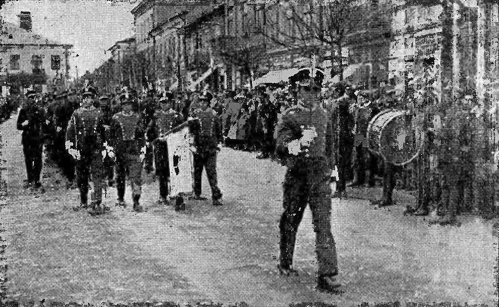 Uczniowie II Państwowego Gimnazjum im. Mikołaja Kopernika w Samborze ze sztandarem szkoły podczas defilady w święto Konstytucji 3 Maja (1933).